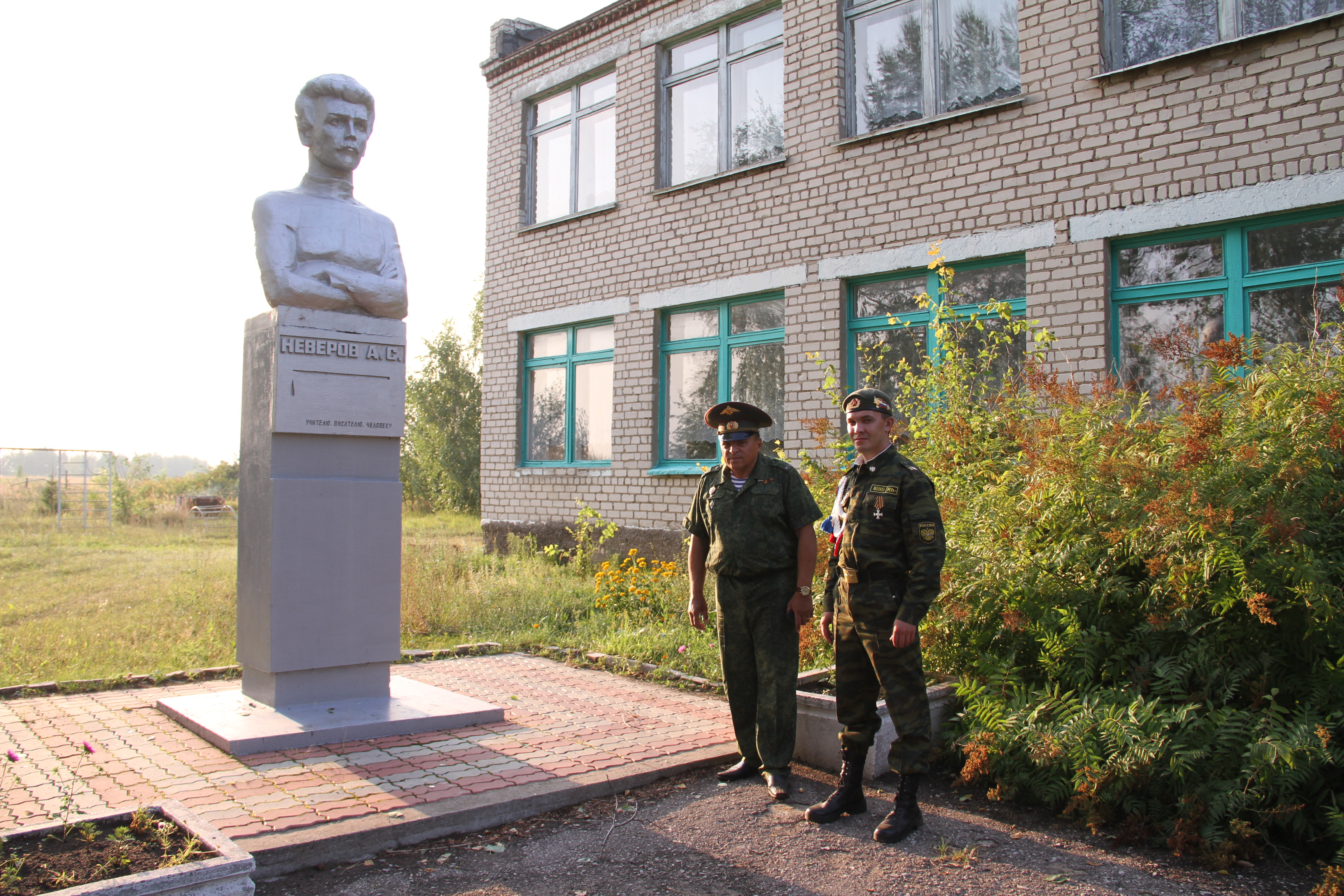 Фотография от 1 августа 2016 года. Автор Дмитрий Борисов (г.Тольятти)